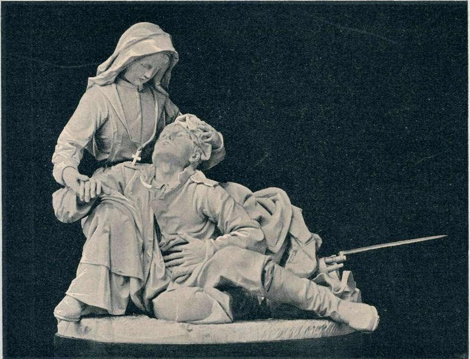 Tolažnica v zadnjem boju, Prizor iz rusko-japonske vojne.